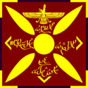 Това е знамето на Сасанидската империя